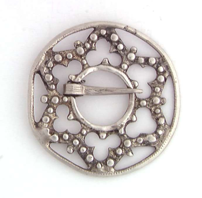 Tindesølje eller taggesøljei sølv fra Tinn I Telemark. Foto Anne-Lise Reinsfelt / Norsk Folkemuseum.